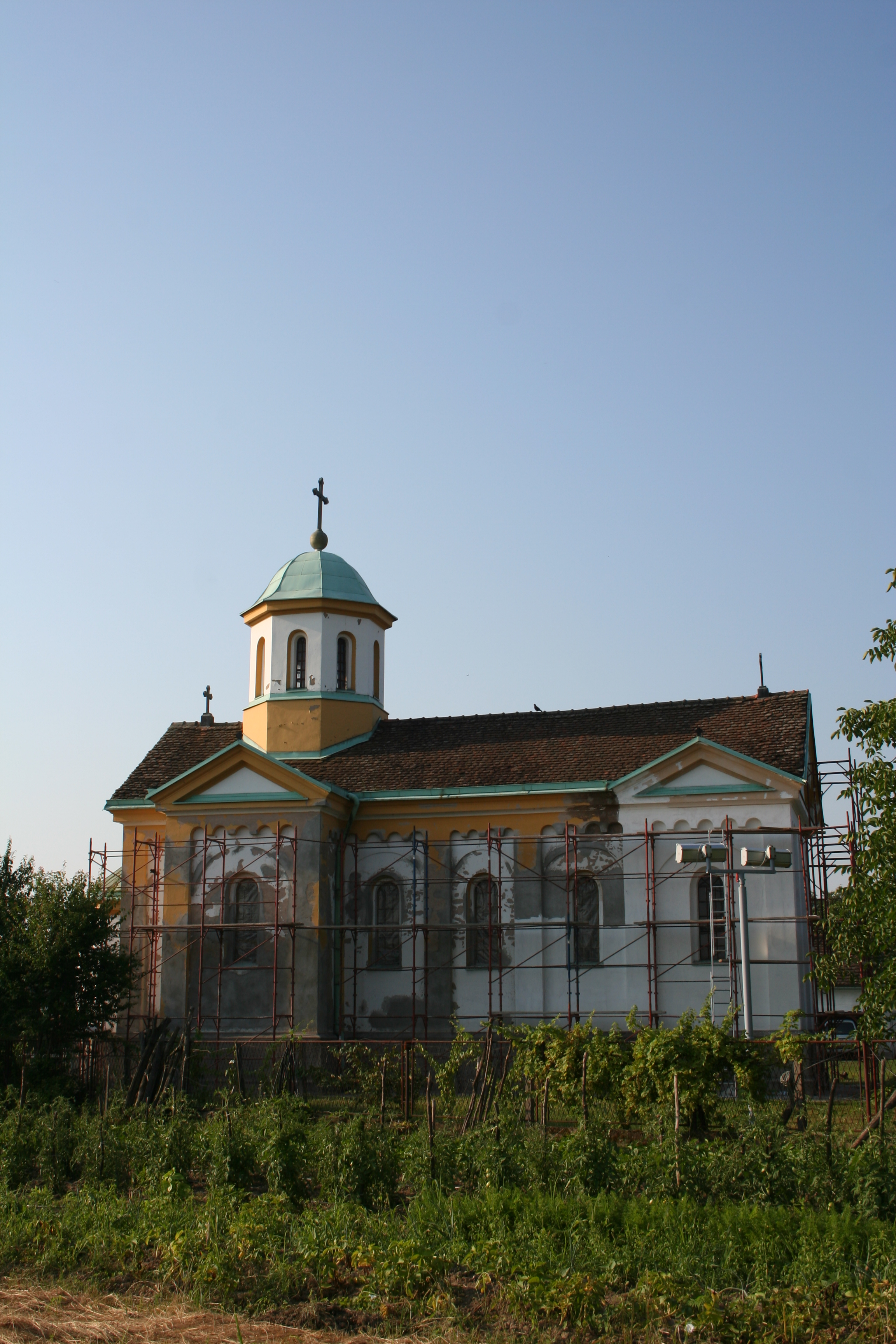 Crkva Svetog Marka, Varna